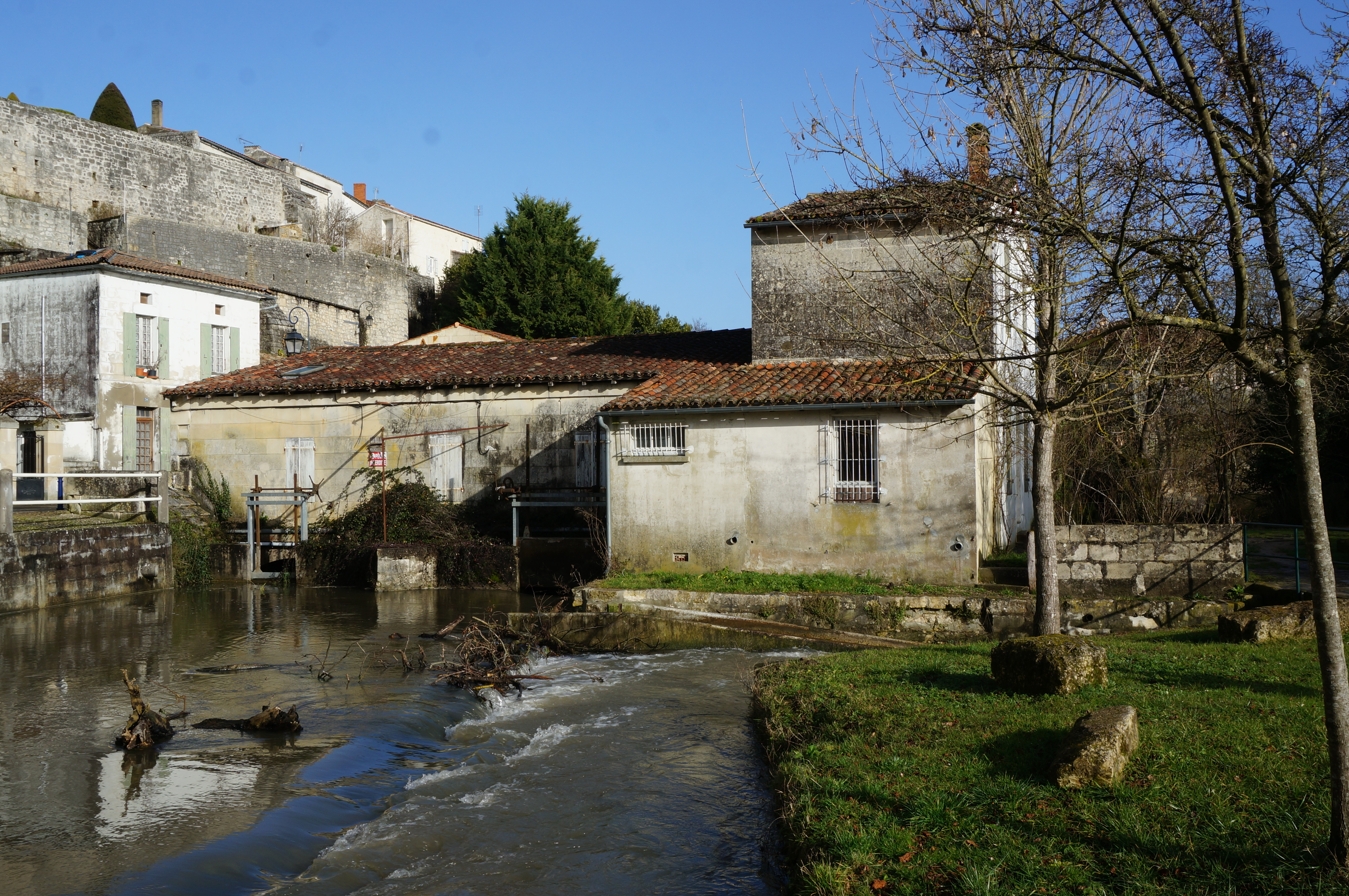 à Pons, un moulin classé sur la Seugne.